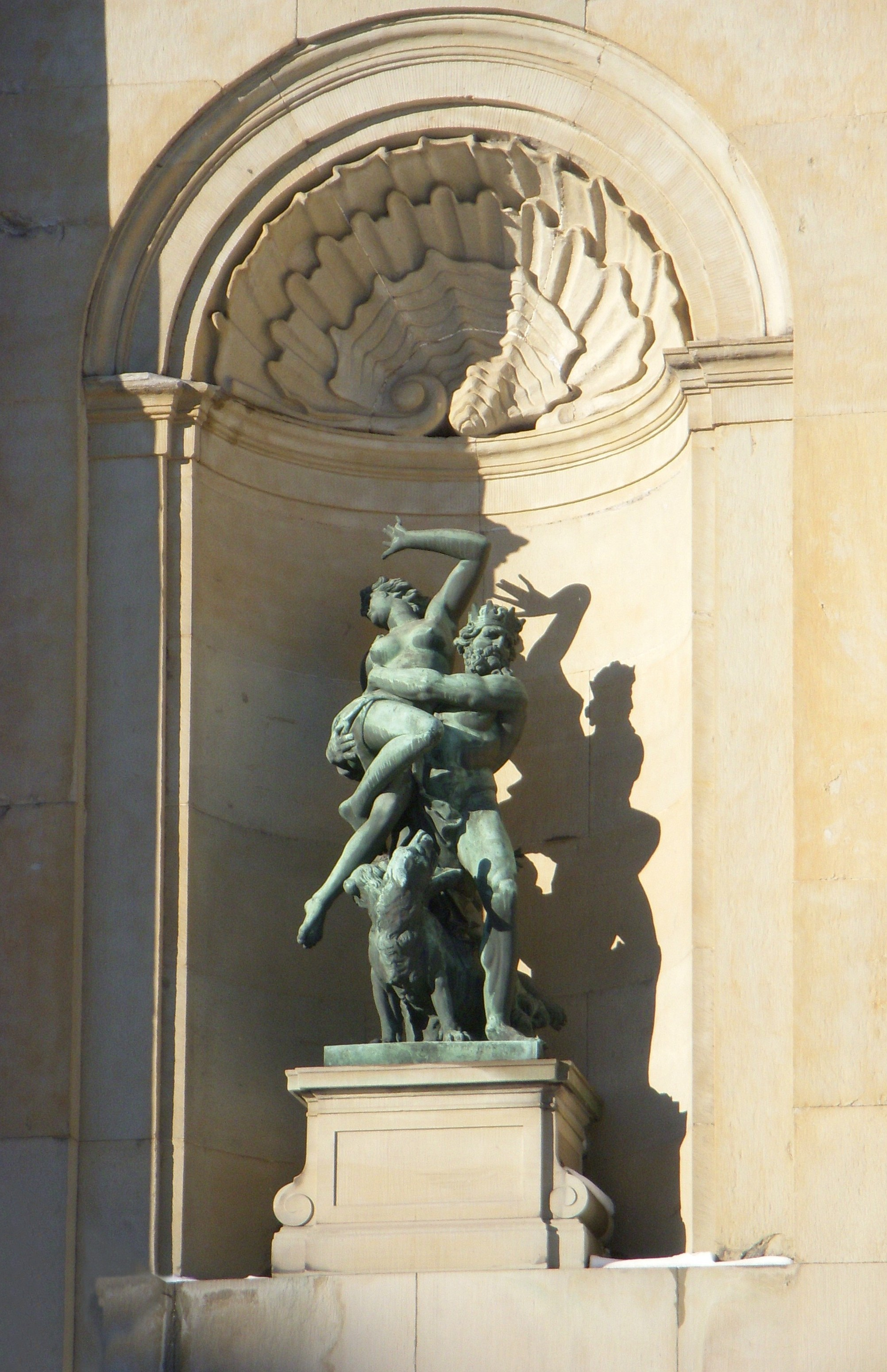 Skulptur på Stockholms slott, sydfasad